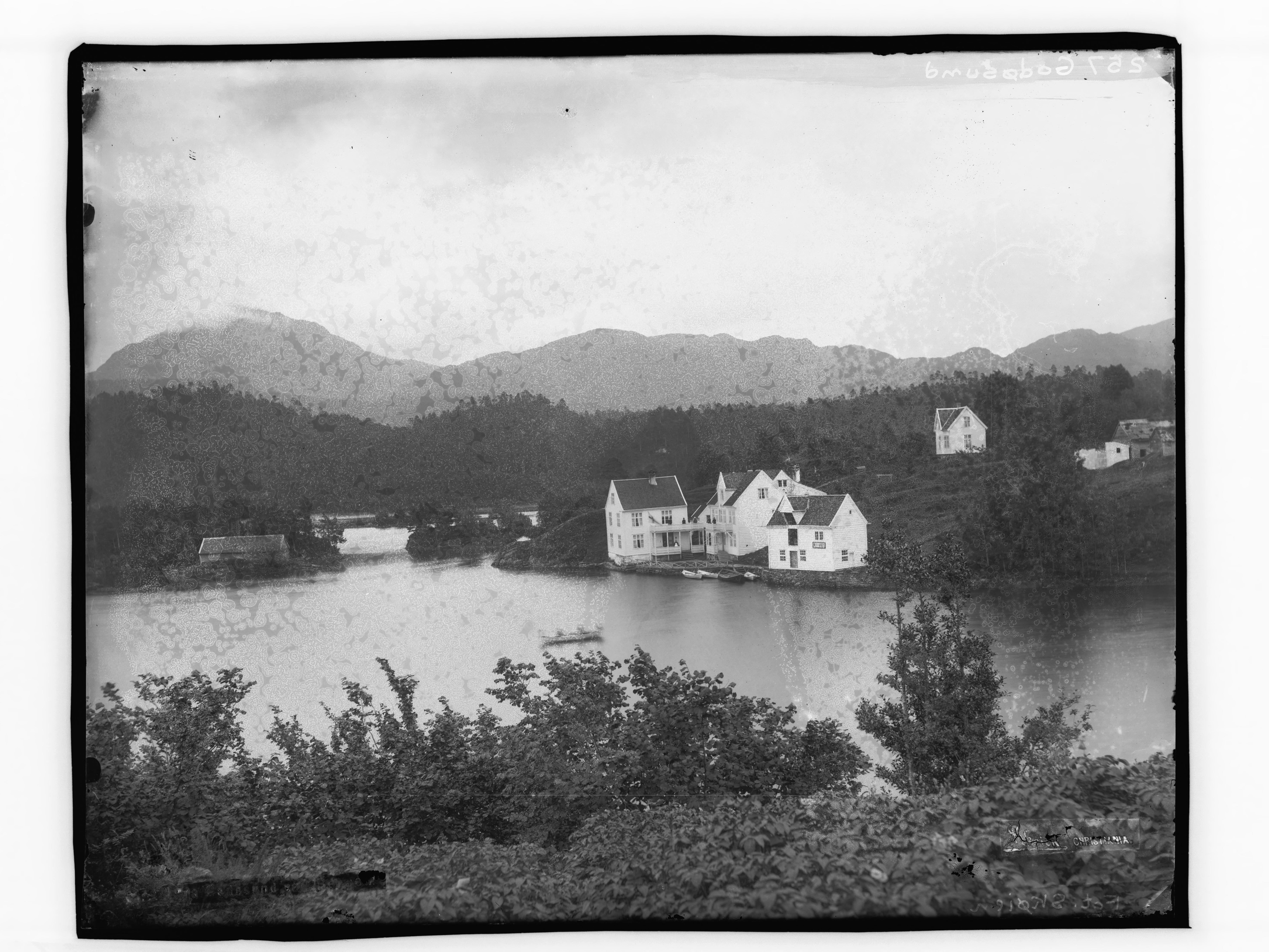 Påskrift negativ: [Uleselig] Godøysund ved Bergen Skøien Christiania Påskrift negativ: 257 Godøsund [Riksantikvaren] Påskrift konvolutt: B-257 Godøsund. Tysnes. [Riksantikvaren] Sted: Godøysund Kommune: Tysnes Fylke: Hordaland Tagger: landskap grend fjord